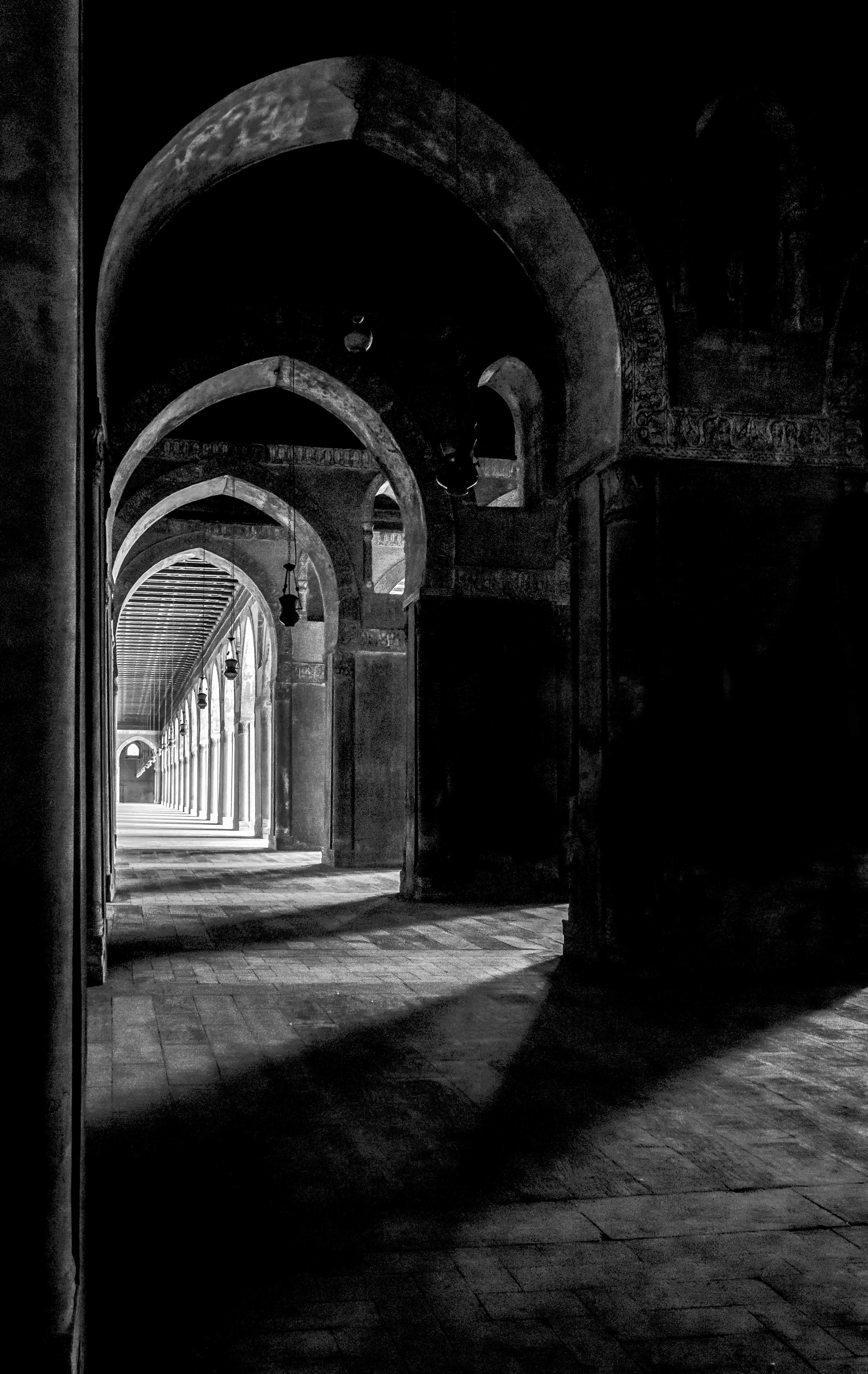 عراقة واصالة مسجد احمد بن طولون - مدينة القاهرة